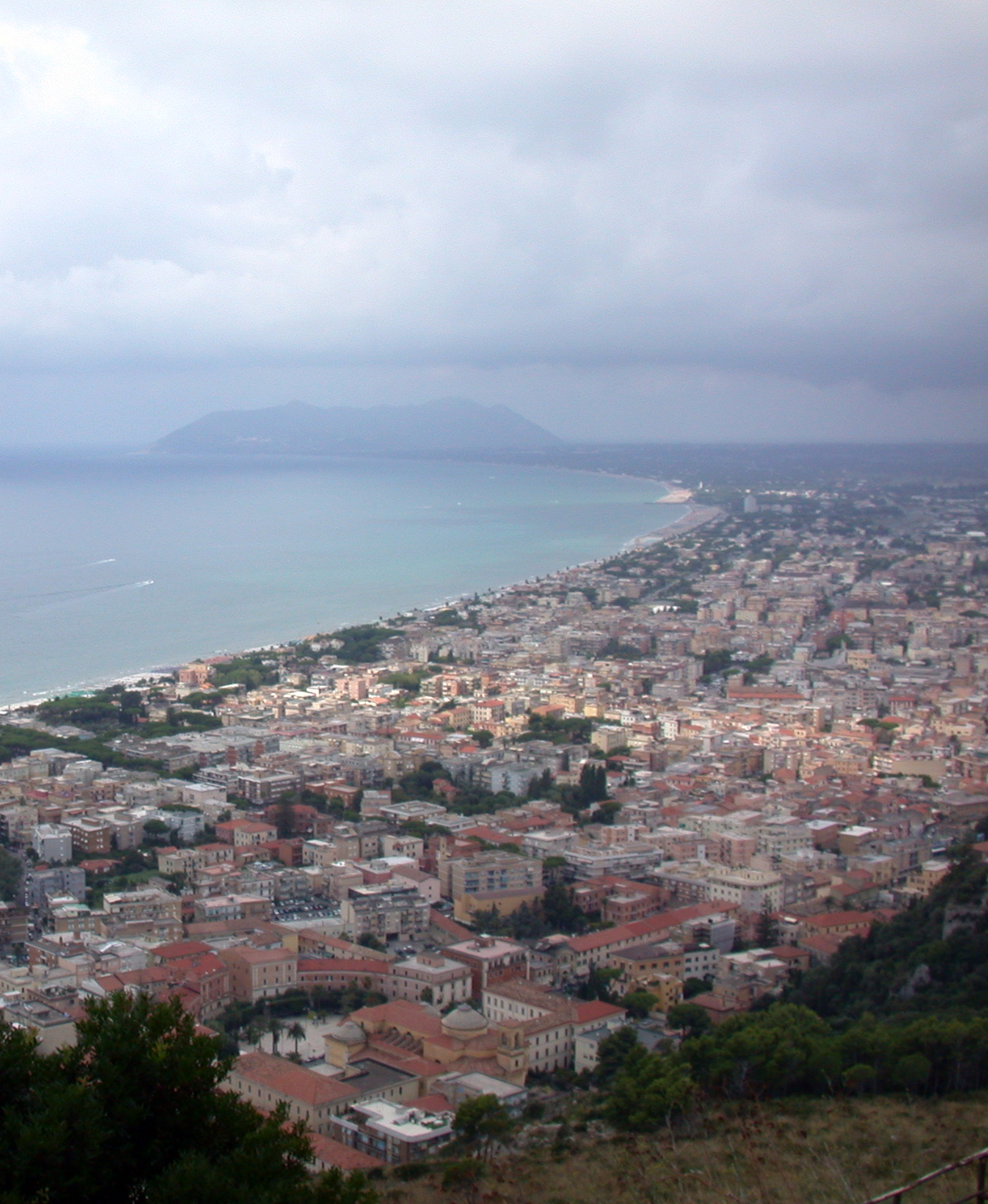 Terracina (provincia di Latina, Lazio, Italia), panorama verso il Circeo dal tempio di Giove Anxur.